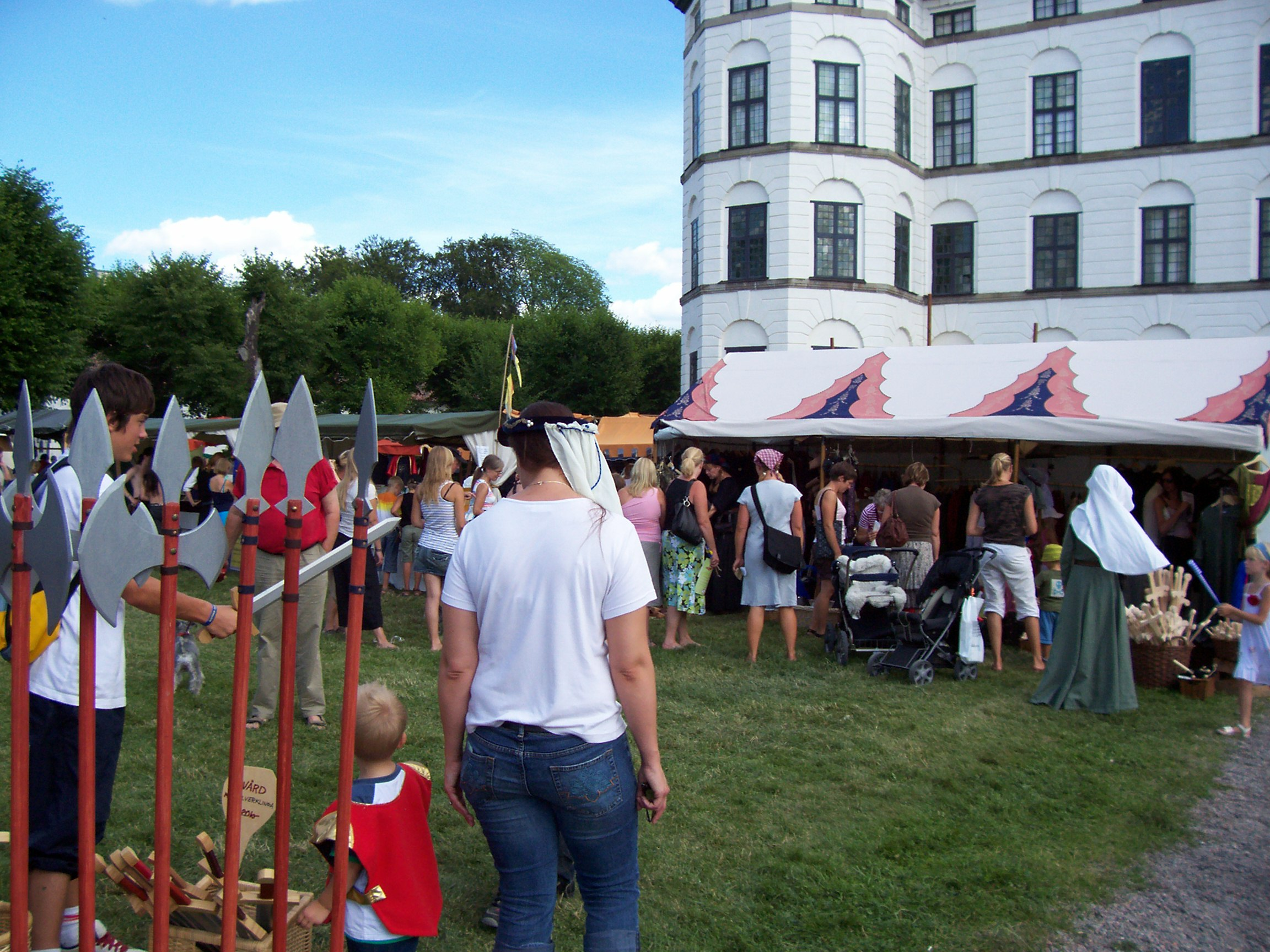 Skoklosterspelen, Sweden